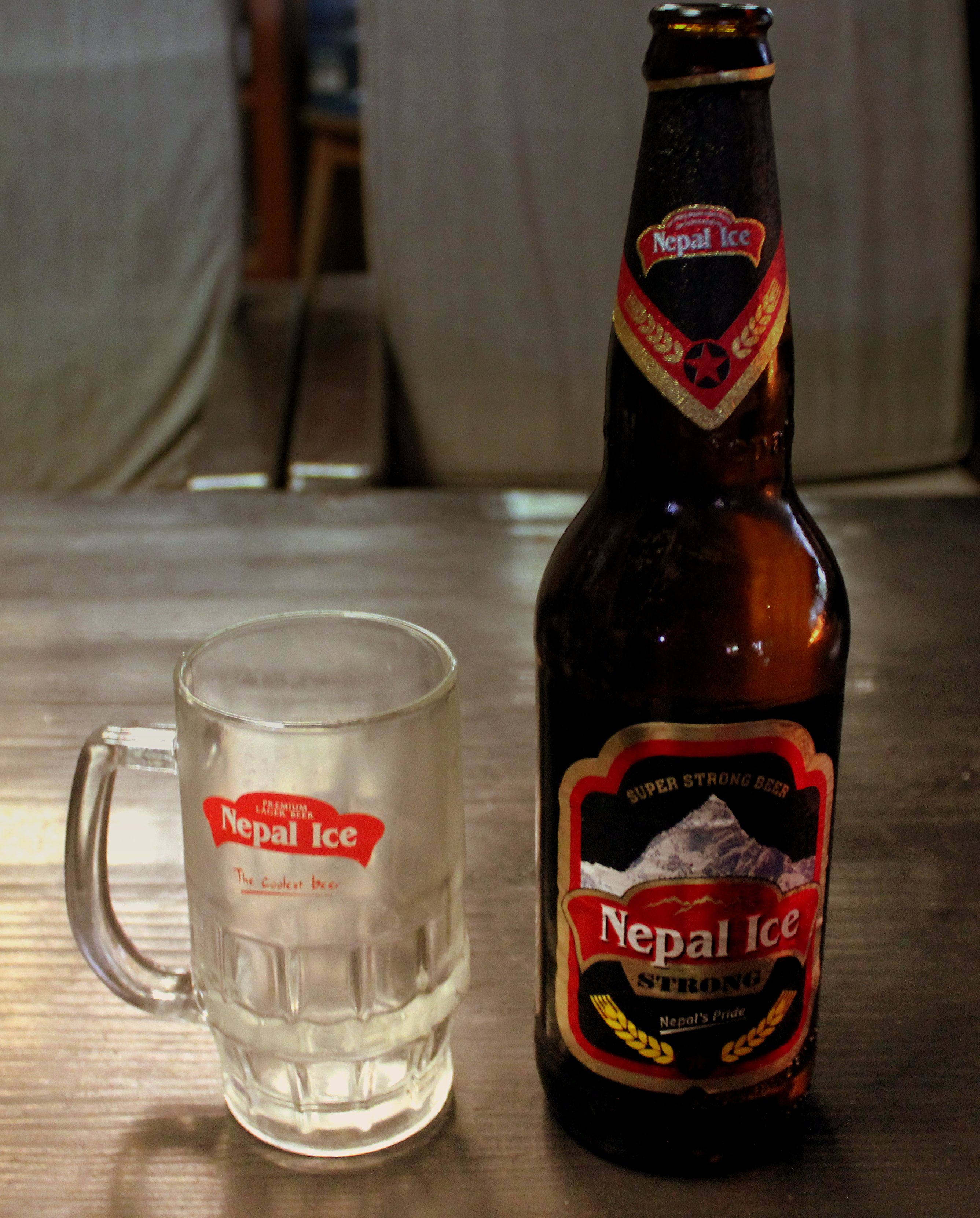 THIS BEER IS 7% SG AND IS VERY STRONG BUT VERY PLEASANT AT THE END OF THE DAY